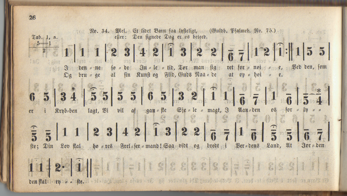 Siffernoteskrift for I denne søte juletid